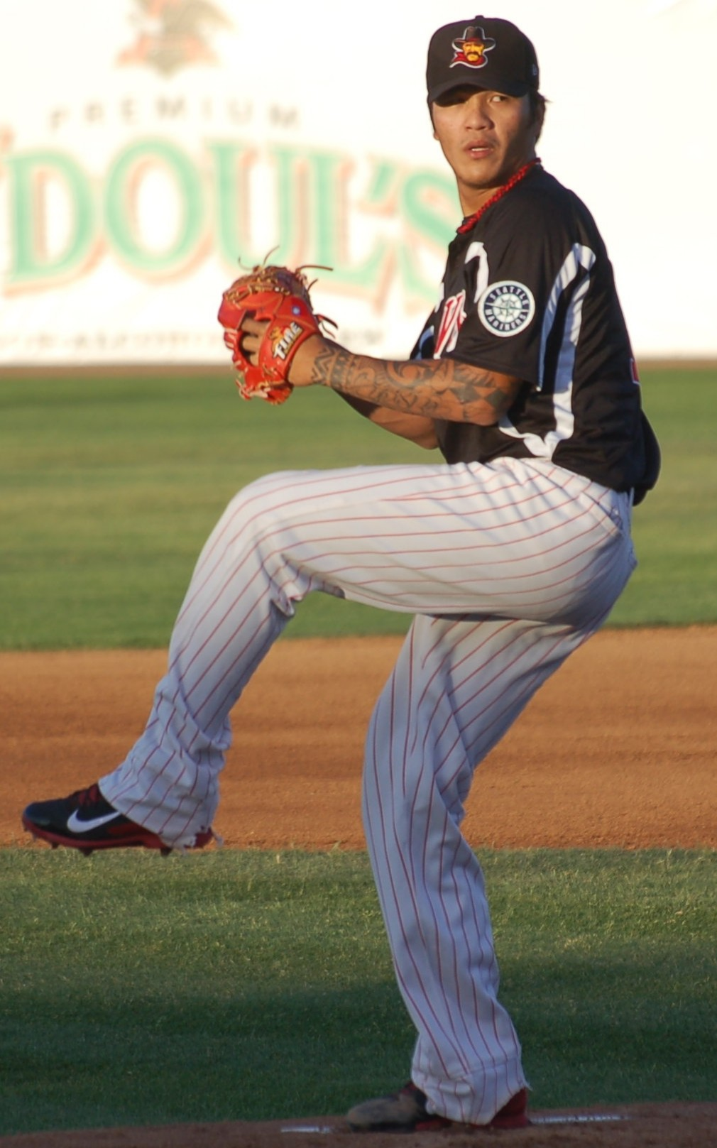 中文（台灣）: 陳敏賜2014年效力於西雅圖水手隊高階1A球隊時期。